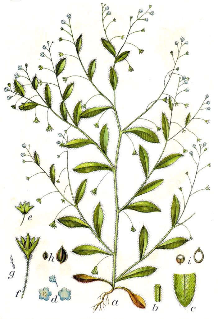 Myosotis sparsiflora J. C. Mikan ex Pohl Original Caption Zerstreutblütiges Vergissmeinnicht, Myosotis sparsiflora